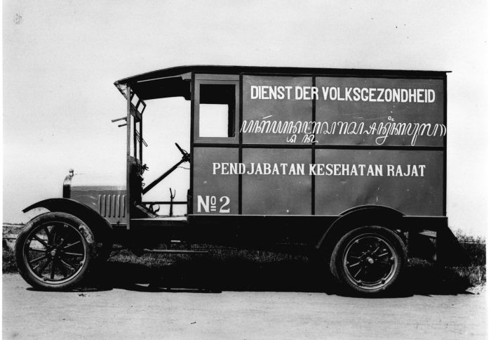 Foto. In 1911 kwam er een zelfstandige Burgerlijk Geneeskundige Dienst (BGD) die tot dan toe onder de Militair Geneeskundige Dienst ressorteerde. In 1925 kreeg de BGD een nieuwe naam, Dienst der Volks Gezondheid (DVG). In 1916 ging de BGD een nieuwe koers varen, later door de DVG overgenomen. Daarbij kreeg de preventieve gezondheidszorg meer nadruk dan de curatieve zorg. Met andere woorden: voorkomen werd beter geacht dan genezen. In 1936 had de DVG 177 Europese artsen in dienst, 316 Indische ('dokter djawa') en 17 Chinese. Daarnaast waren er 150 Europese en 1.210 inheemse verpleegsters, die men mantri-verplegers noemde, plus 150 vroedvrouwen. Dan waren er nog 30 zogeheten malaria-mantris, 435 vaccinateurs en 415 personeelsleden van de pestbestrijding. (P. Boomgaard, 2001). Demonstratieauto van de Dienst der Volksgezondheid, ca. 1925